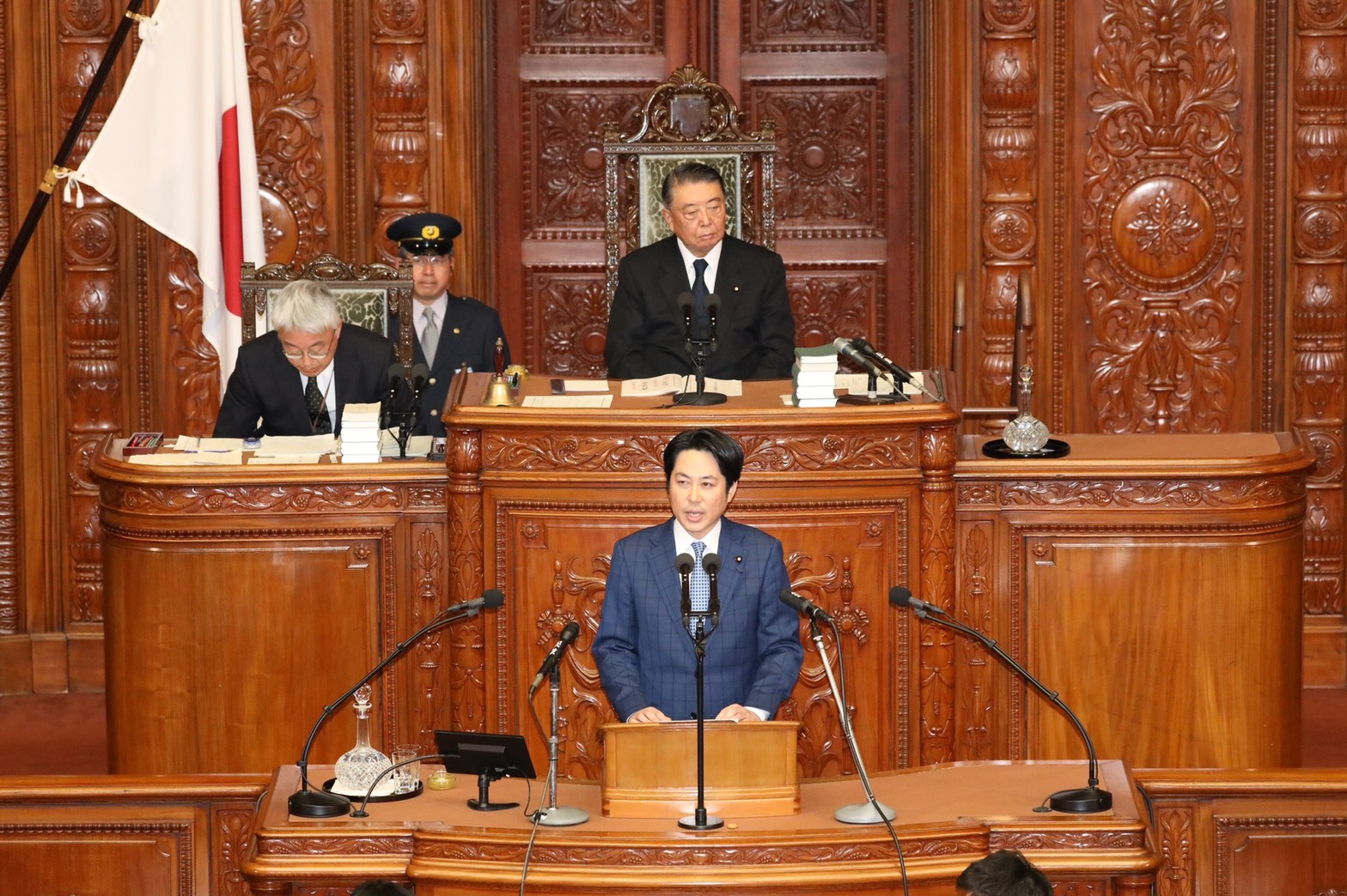 2019年11月7日に衆議院本会議で質疑に立つ落合貴之